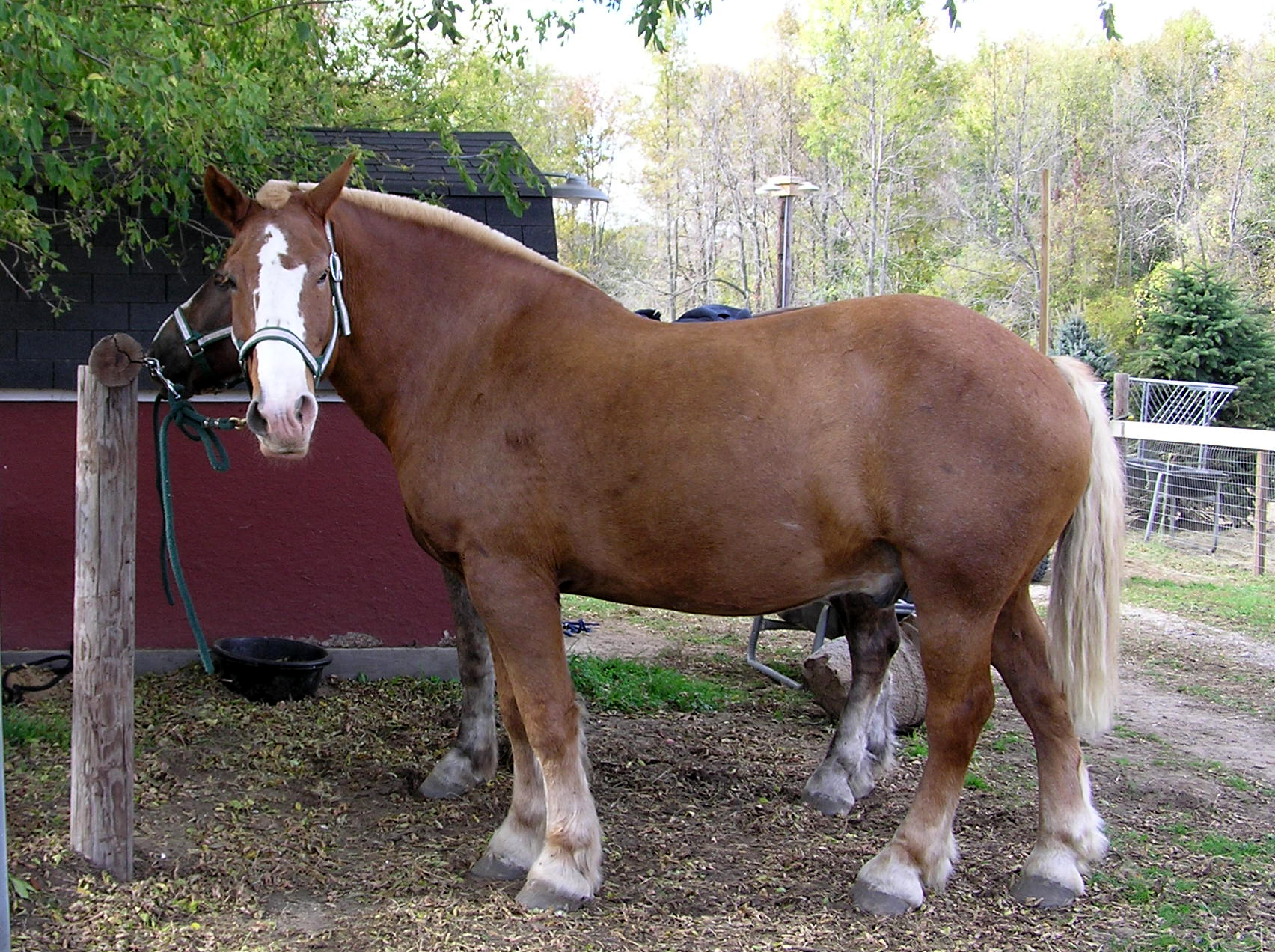 gotta love a draft horse mug (Belgian draft horse)